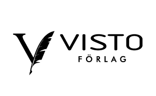 Logotyp för Visto förlag